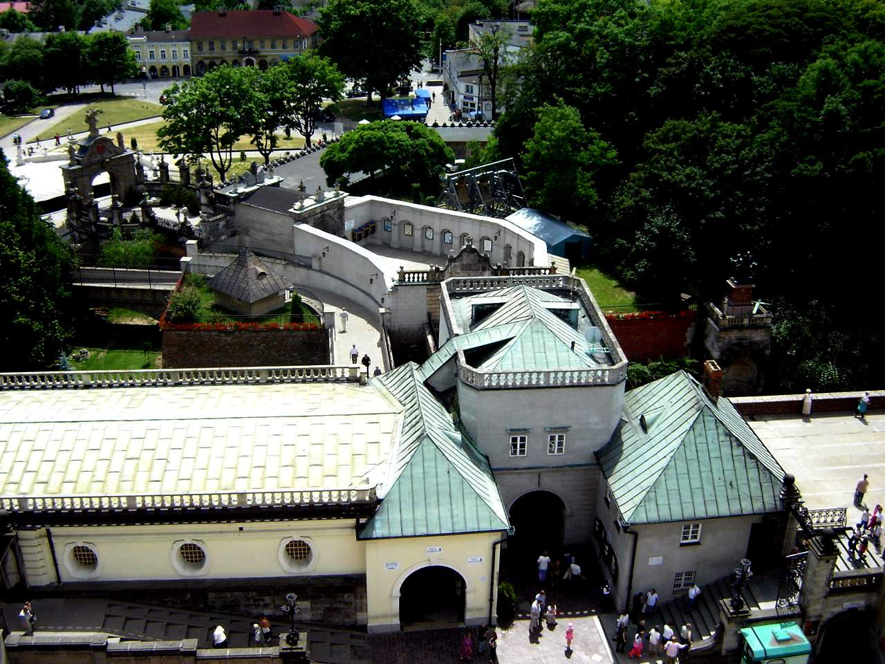 Bramy od strony południowej widziane z wieży. Kolejno od dołu zdjęcia: Brama Wałowa, Brama Matki Boskiej Bolesnej, Brama MB Królowej Polski, Brama Lubomirskich